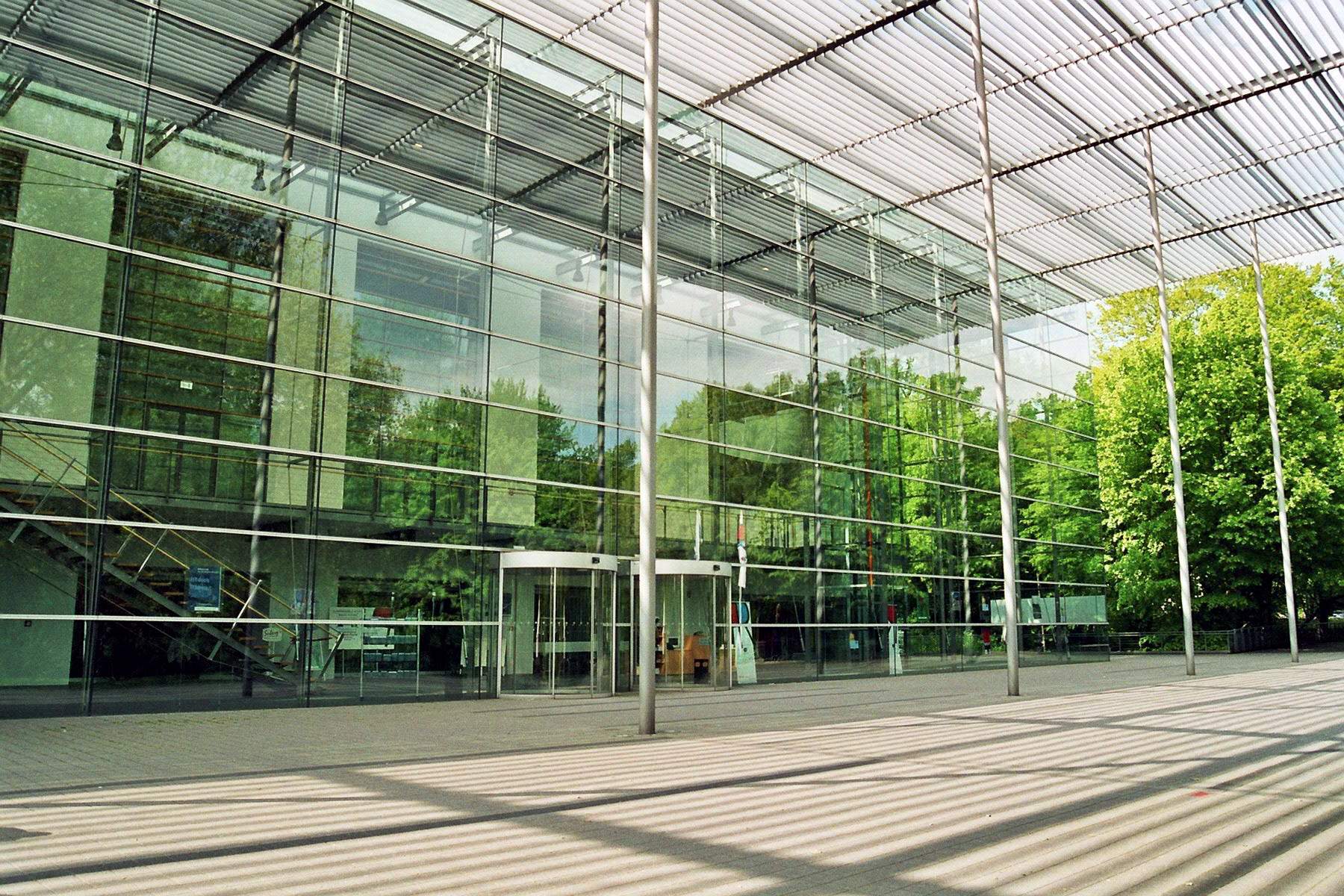 Ruhrfestspielhaus, Ruhrfestspiele Recklinghausen